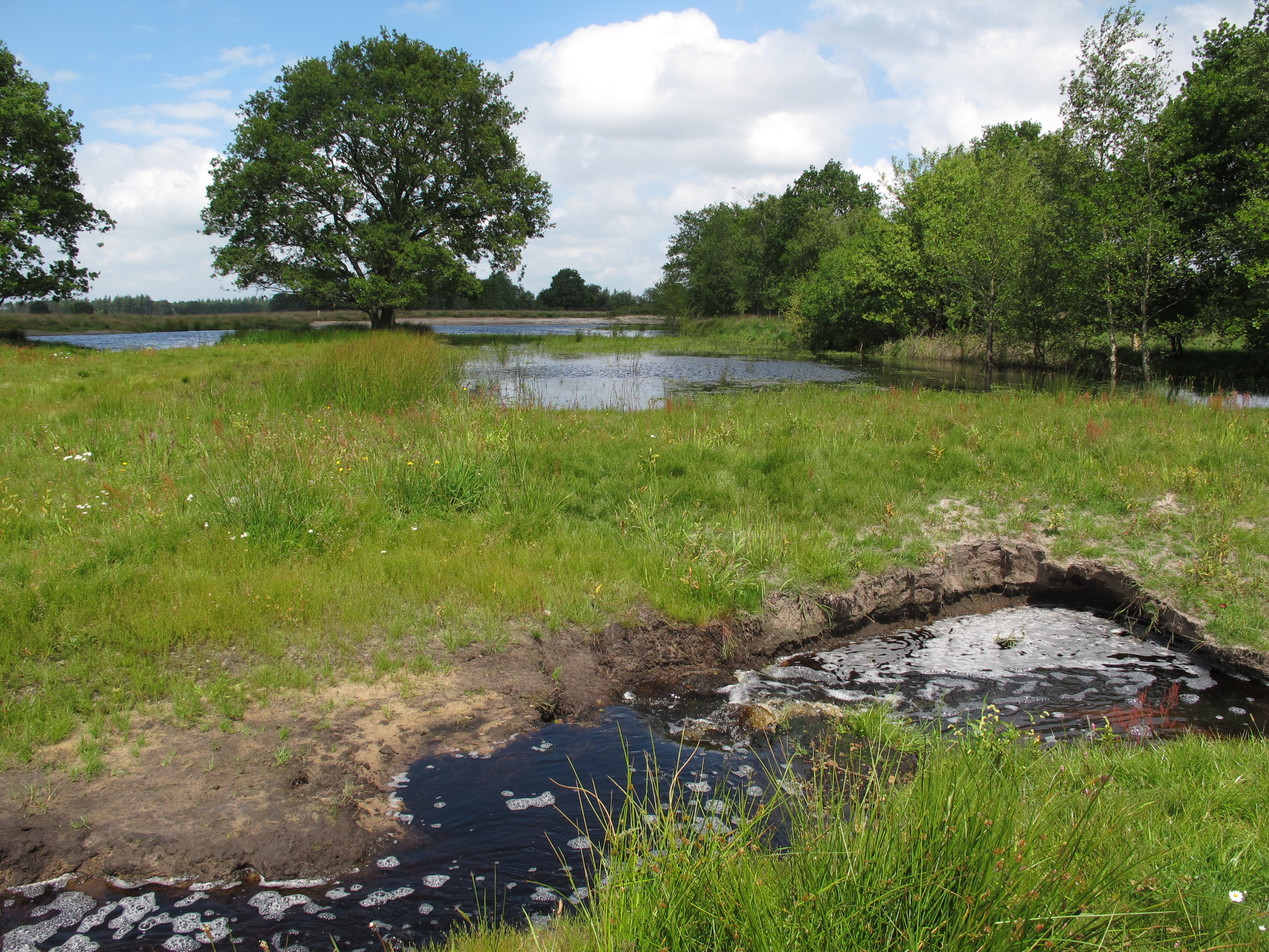 De vernieuwde meanderende loop van de Vledder Aa, met op de achtergrond waterberging This is a photo or sound file made in Drents-Friese Wold National Park in the Netherlands, with the main subject of the file in the category: landscapes